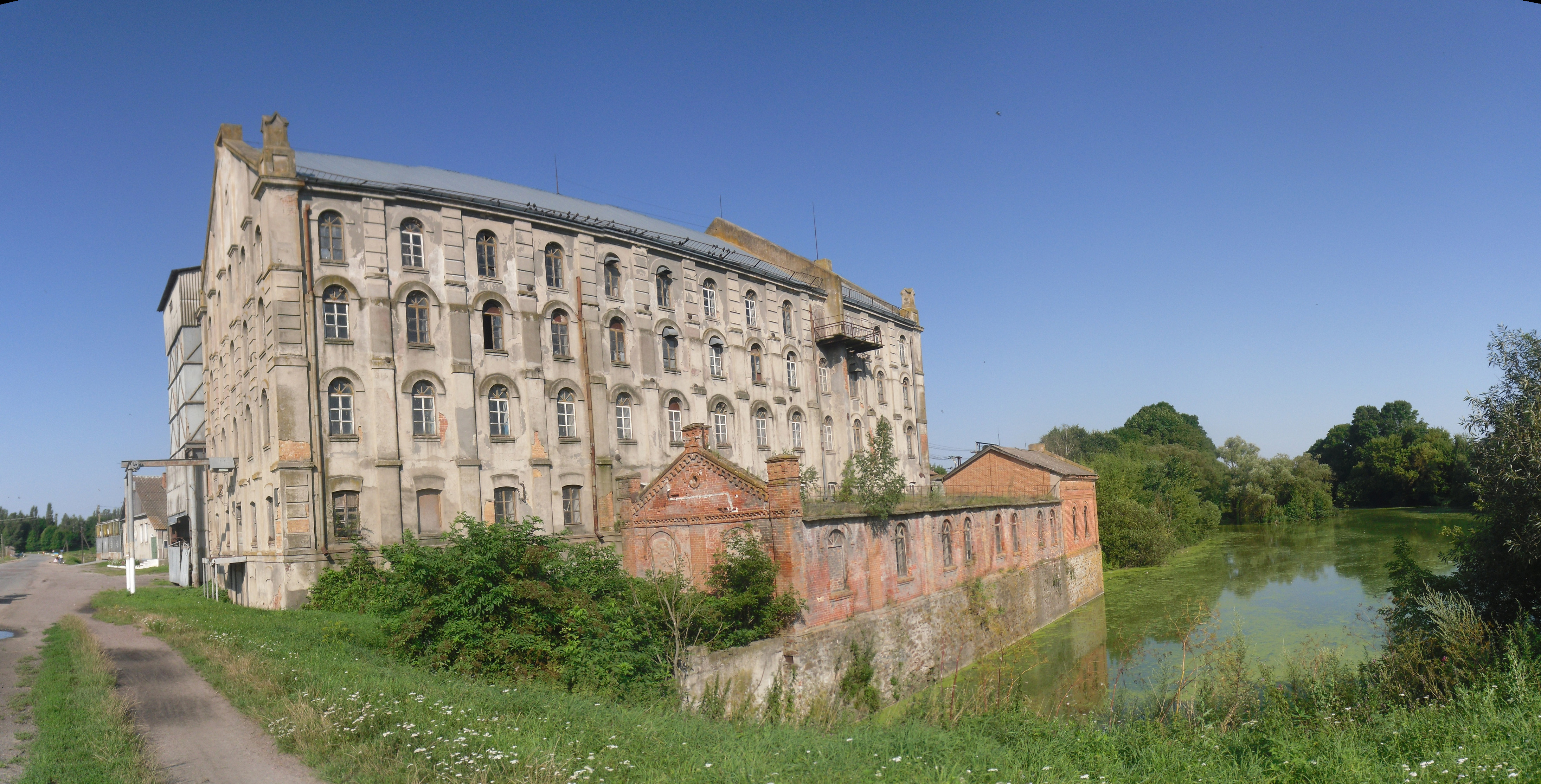 Паровий млин (мур.), с.Нова Чортория